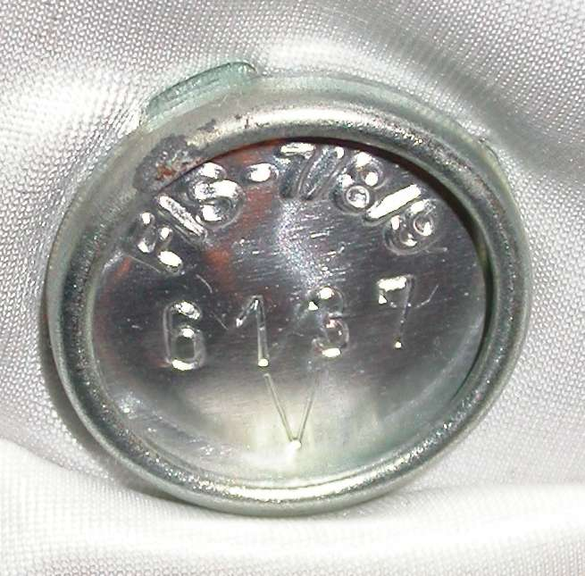 FIS-Prüfzeichen auf einem Abfahrtsanzug